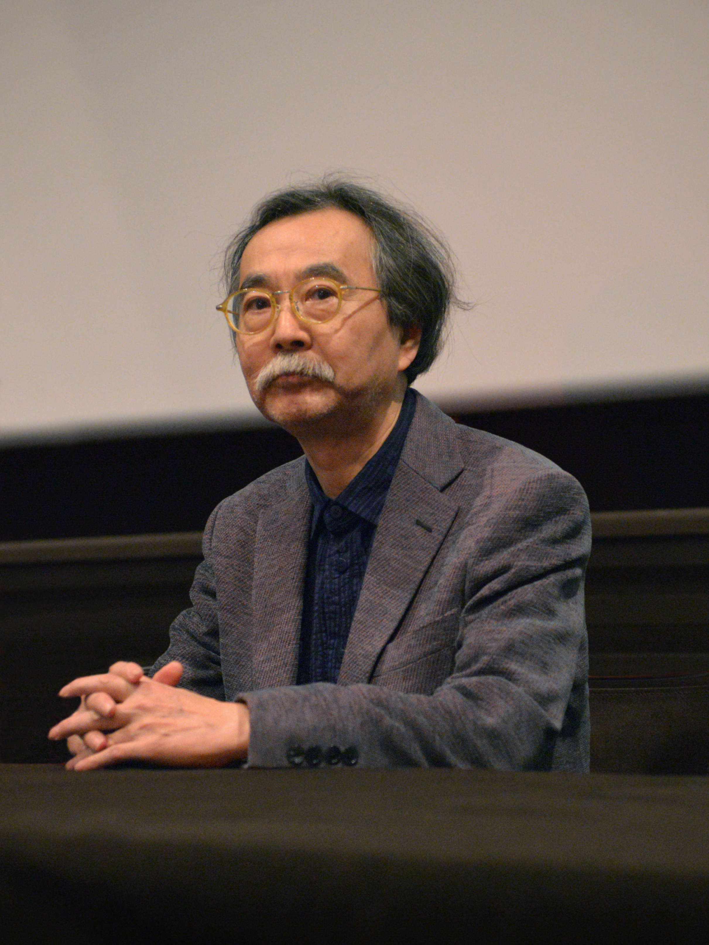 Jiro Taniguchi au Festival International de la BD d'Angoulême 2015.